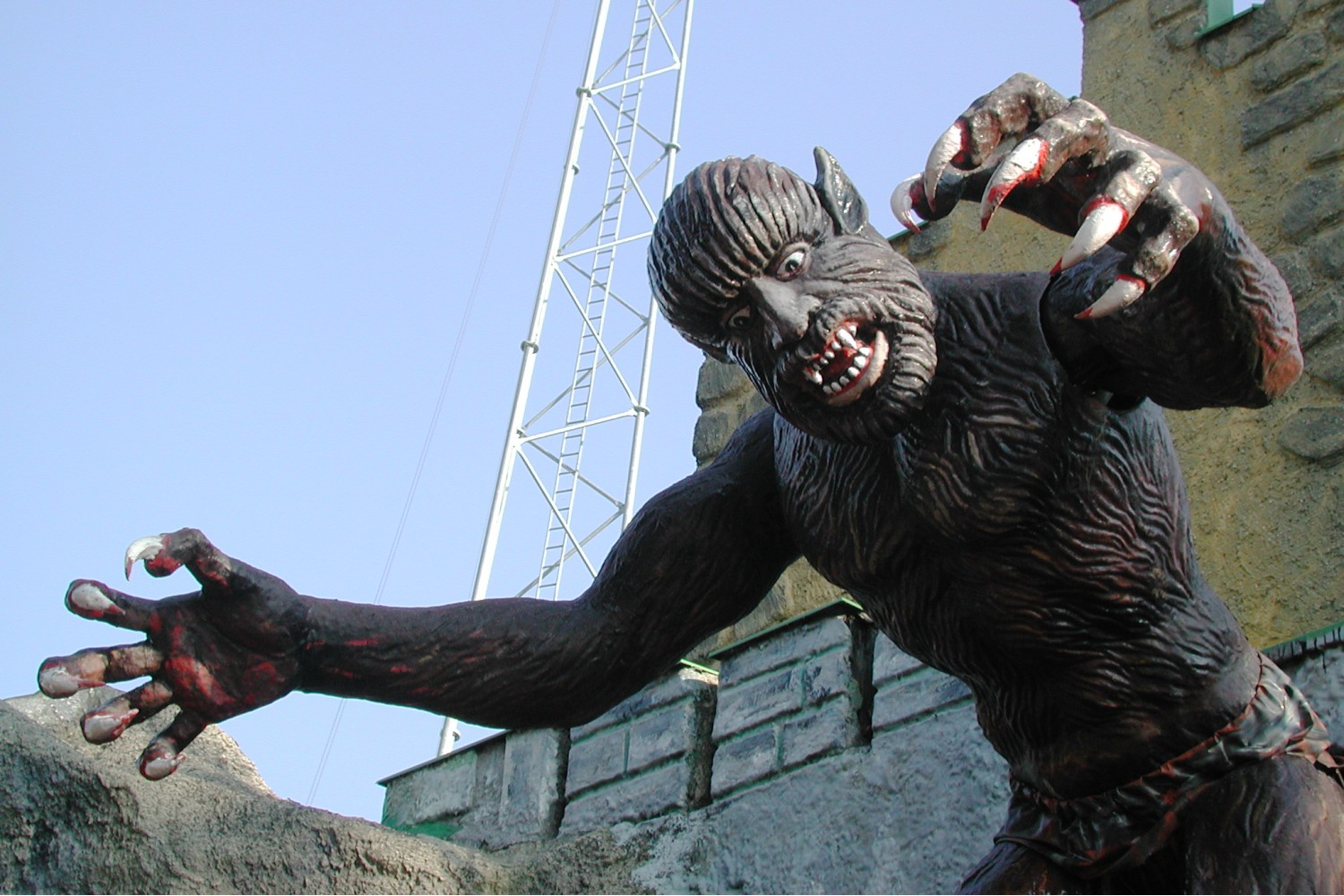 Description: Monster at the ghost train in the Prater amusement park in Vienna - Geisterbahnfigur im Wiener Prater own image, taken October 15, 2000 Photographer: Herbert Ortner, Vienna, Austria